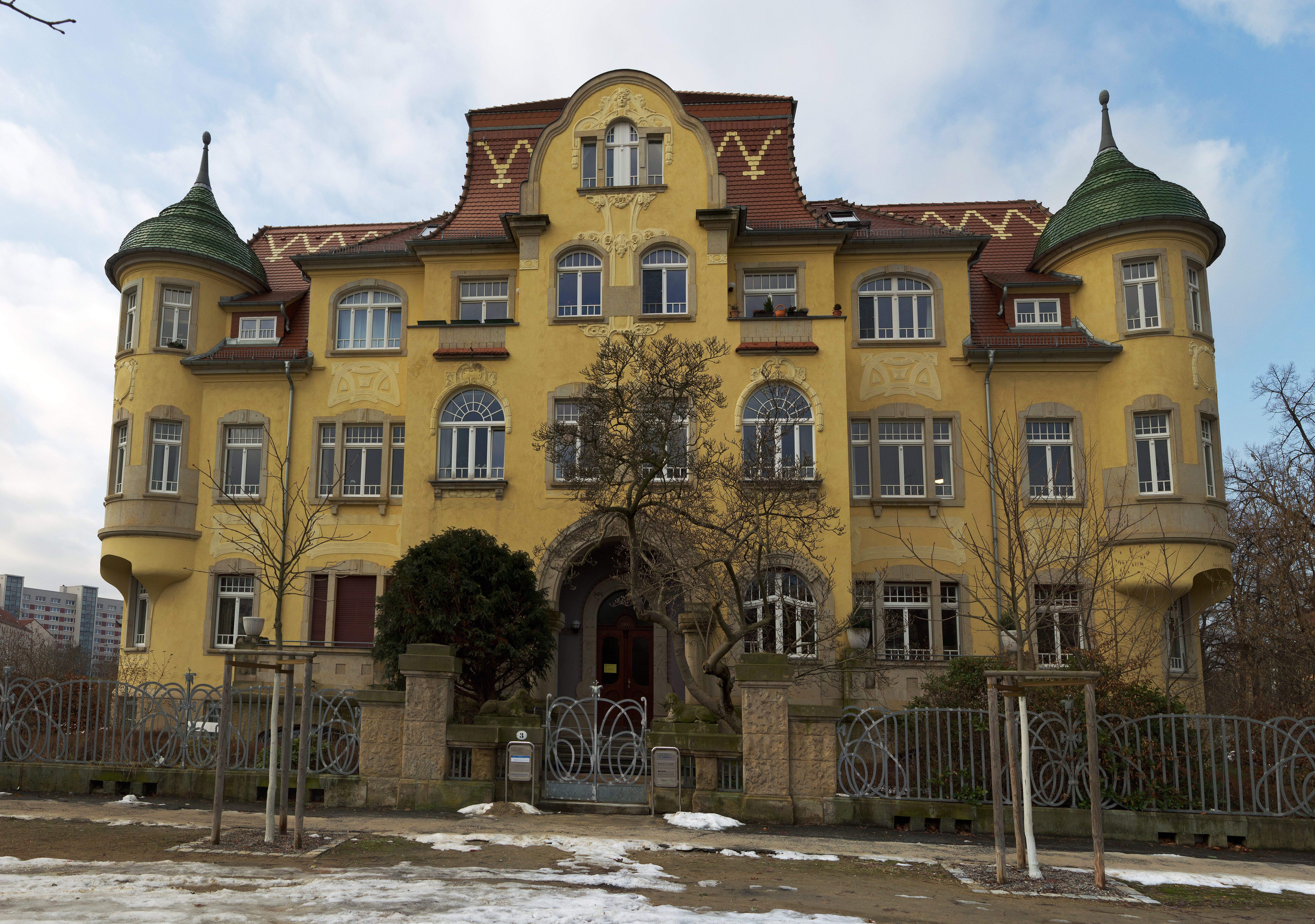 Walderseeschlößchen am Stresemannplatz 3 in Dresden-Striesen nicht ganz frontal aufgenommen....